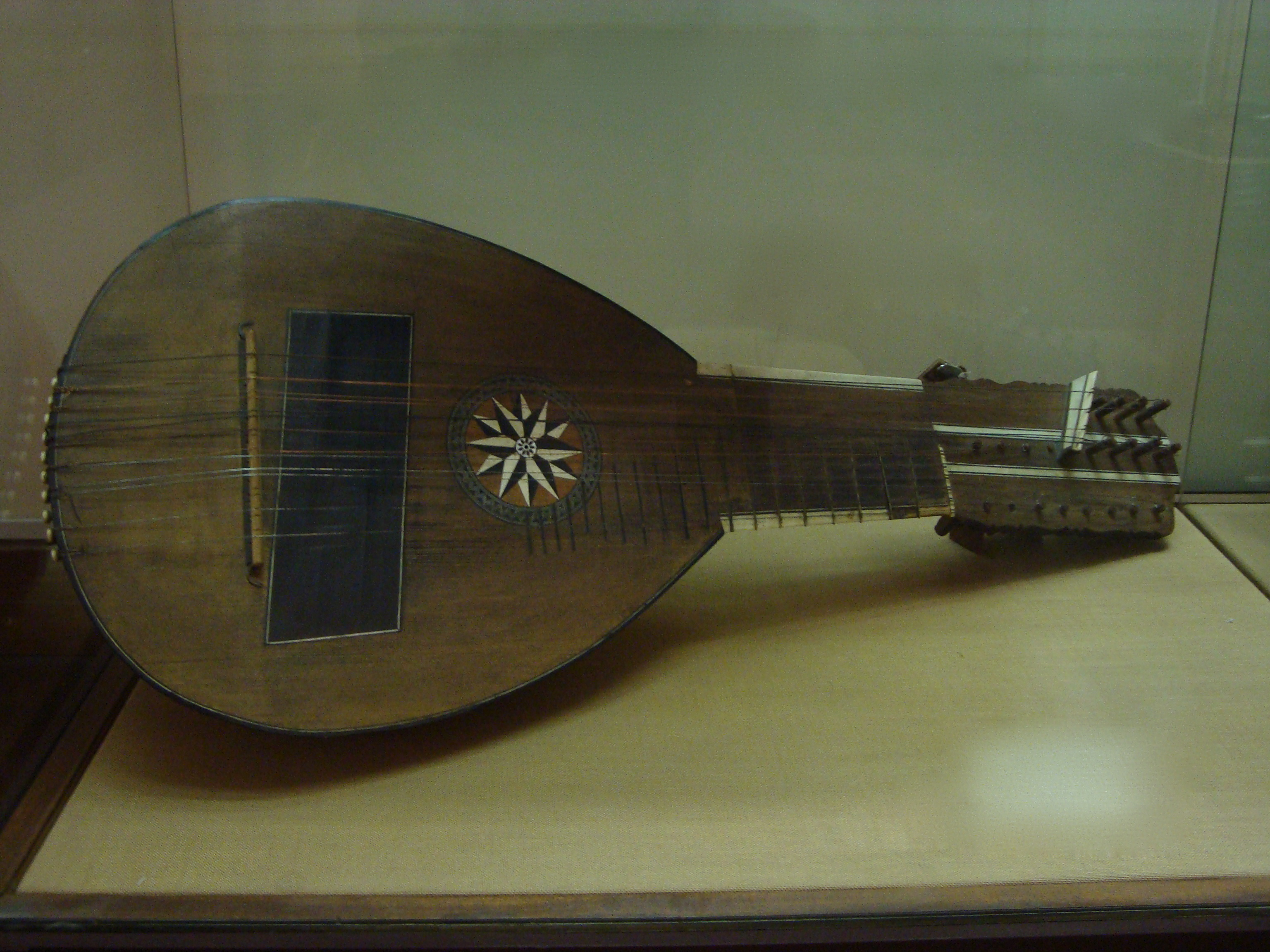 Mandolone, XIXe siecle, Museo degli Strumenti Musicali de Rome